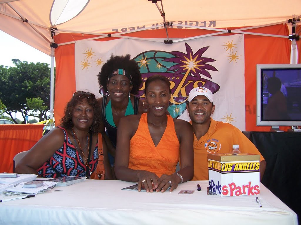 La basketteuse américaine Lisa Leslie (en orange)